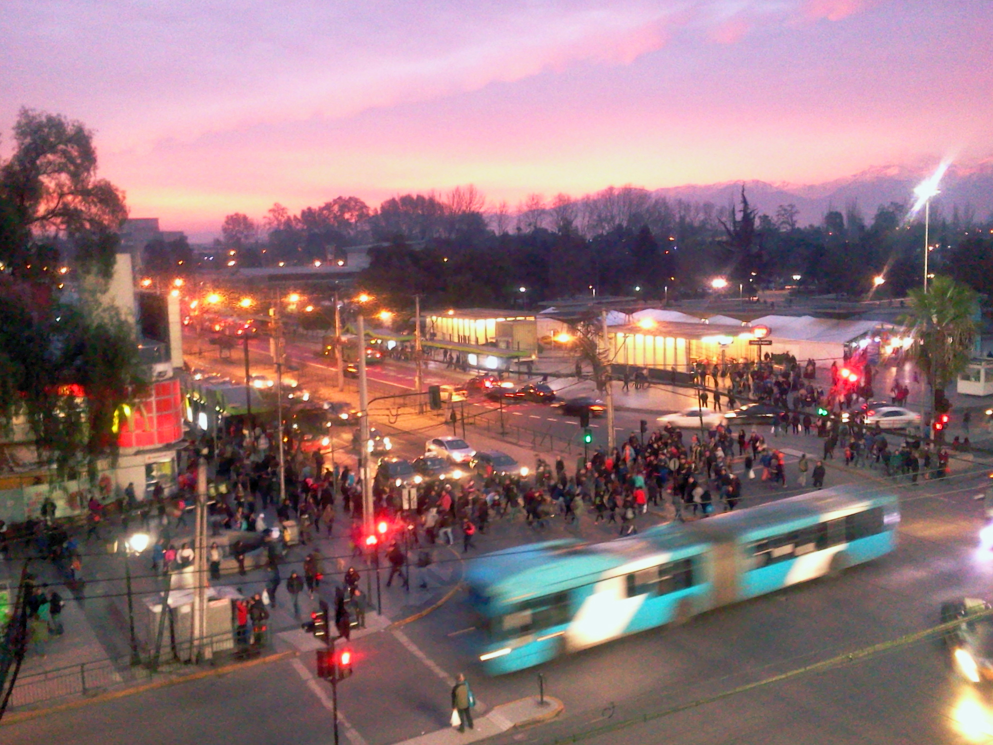 La esquina de las avenidas 5 de Abril y Pajaritos junto a la estación Plaza de Maipú (Línea 5 del Metro de Santiago).